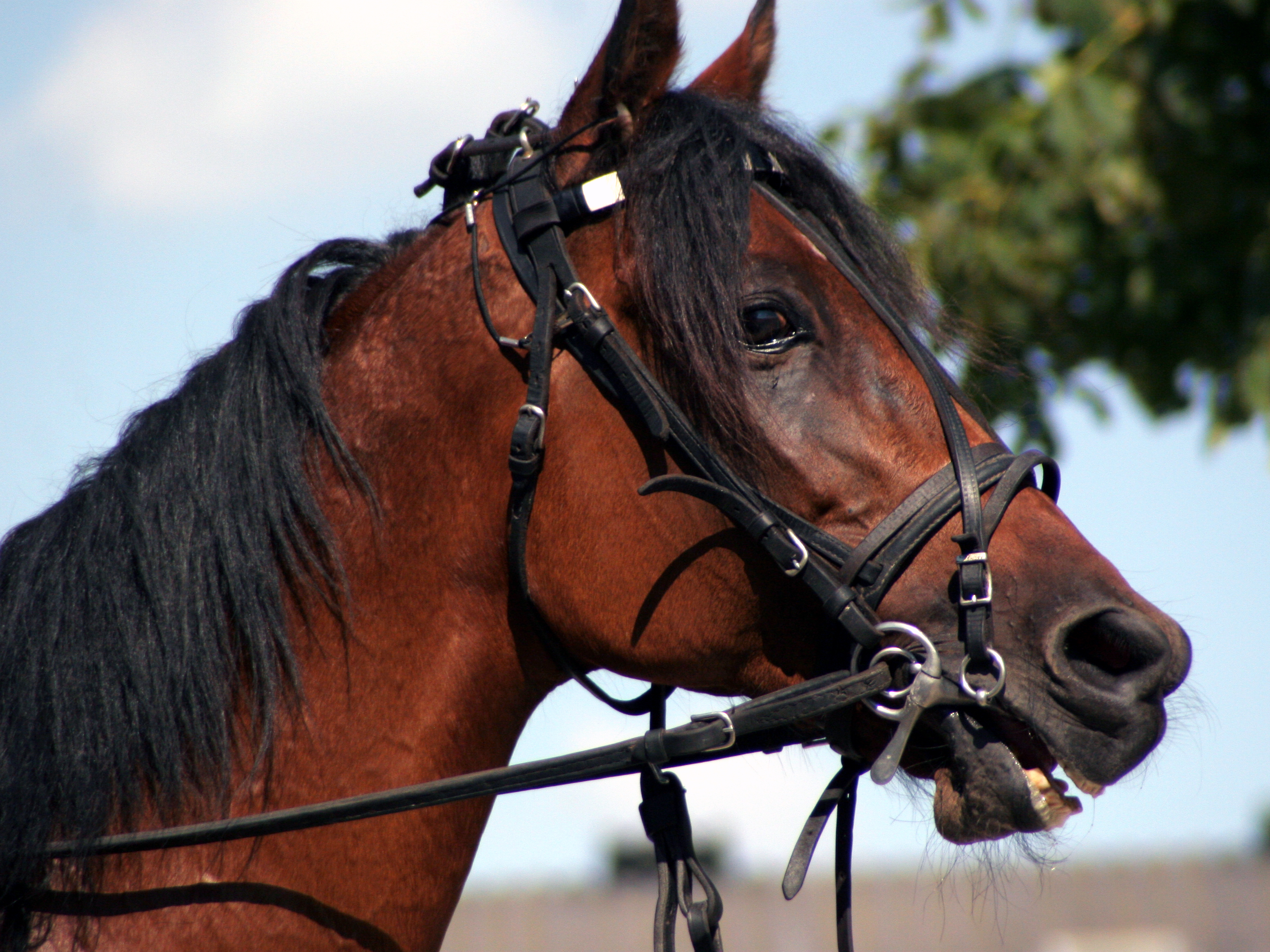 Trense Overcheck aufgezäumt